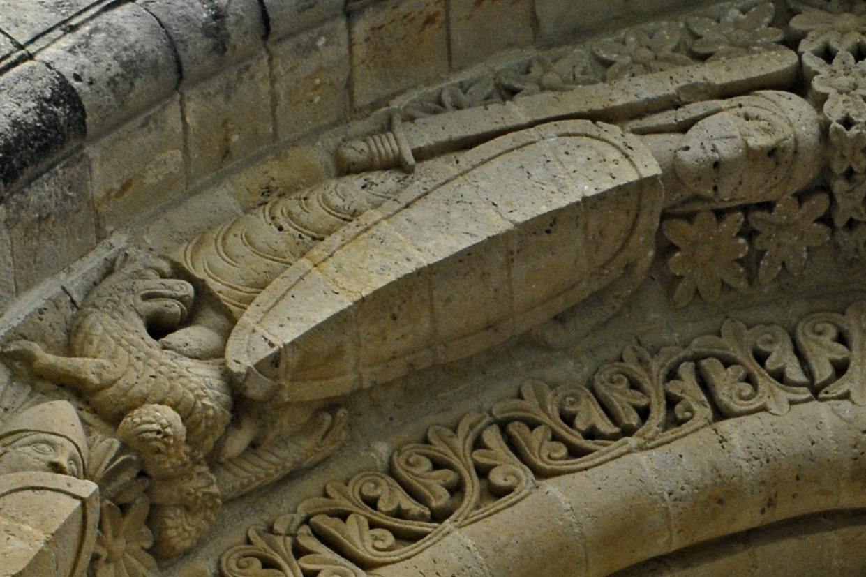 St.-Pierre Aulnay, Detail Archivoltenfenster über Südportal